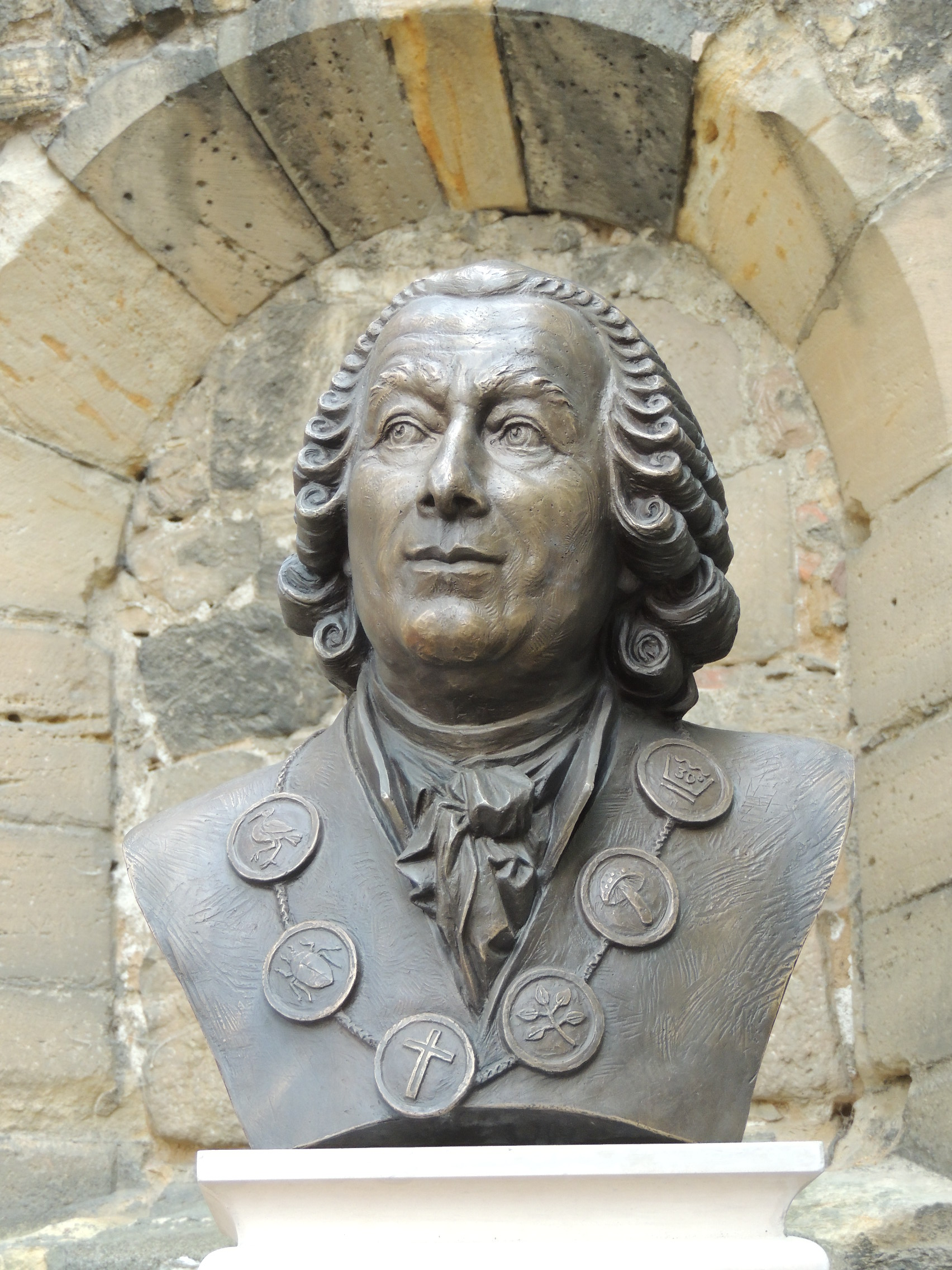 Zum 300. Geburtstag des Theologen und Naturforschers wurde Jacob Christian Schäffer ein Denkmal auf dem Kirchplan seiner Geburtsstadt Querfurt errichtet.